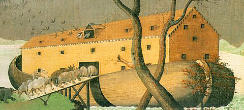 Noah's Ark